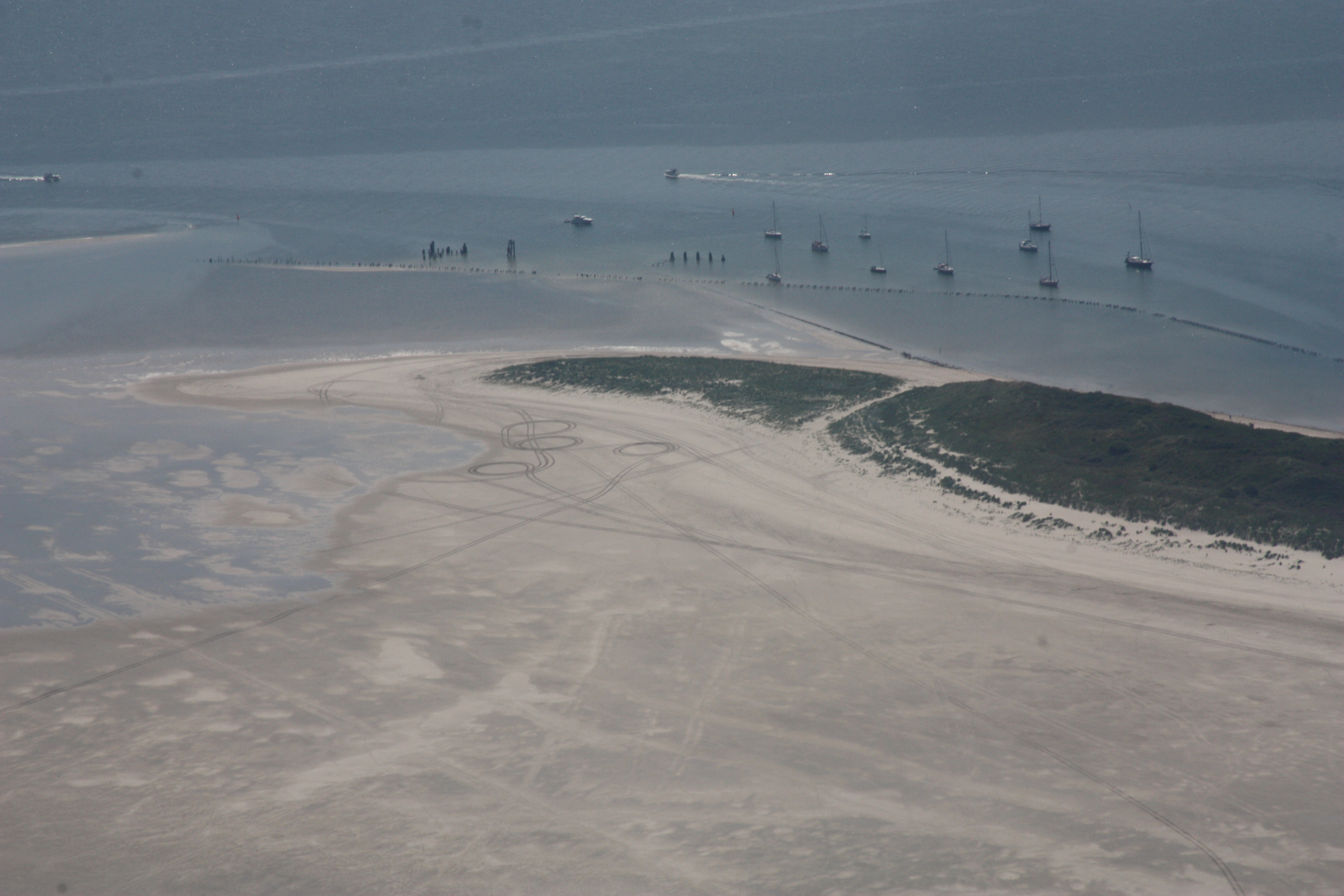 Flug über Wangerooge - von Westen kommend, am Nordstrand entlang; Flughöhe 500 m = 1500 ft; Juli 2010